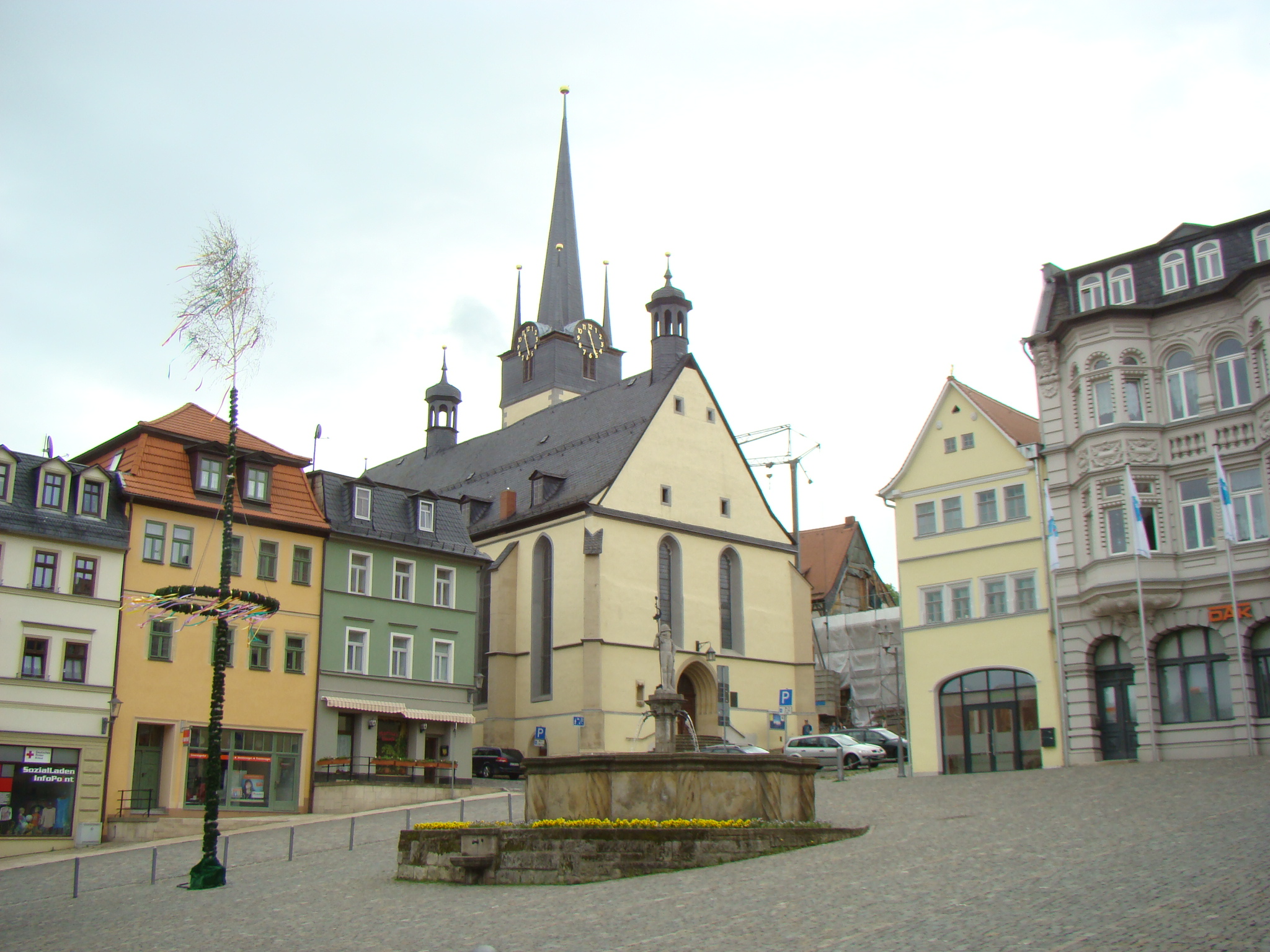 Pößneck